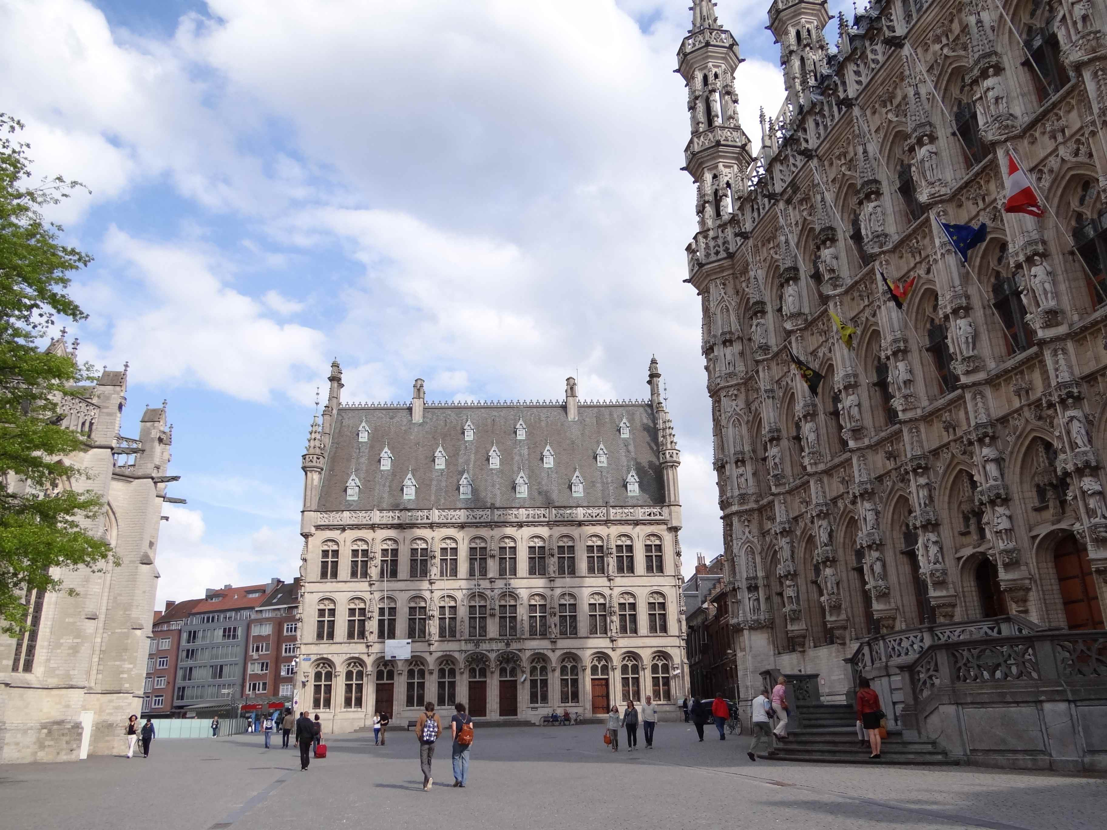 Leuven, Belgium